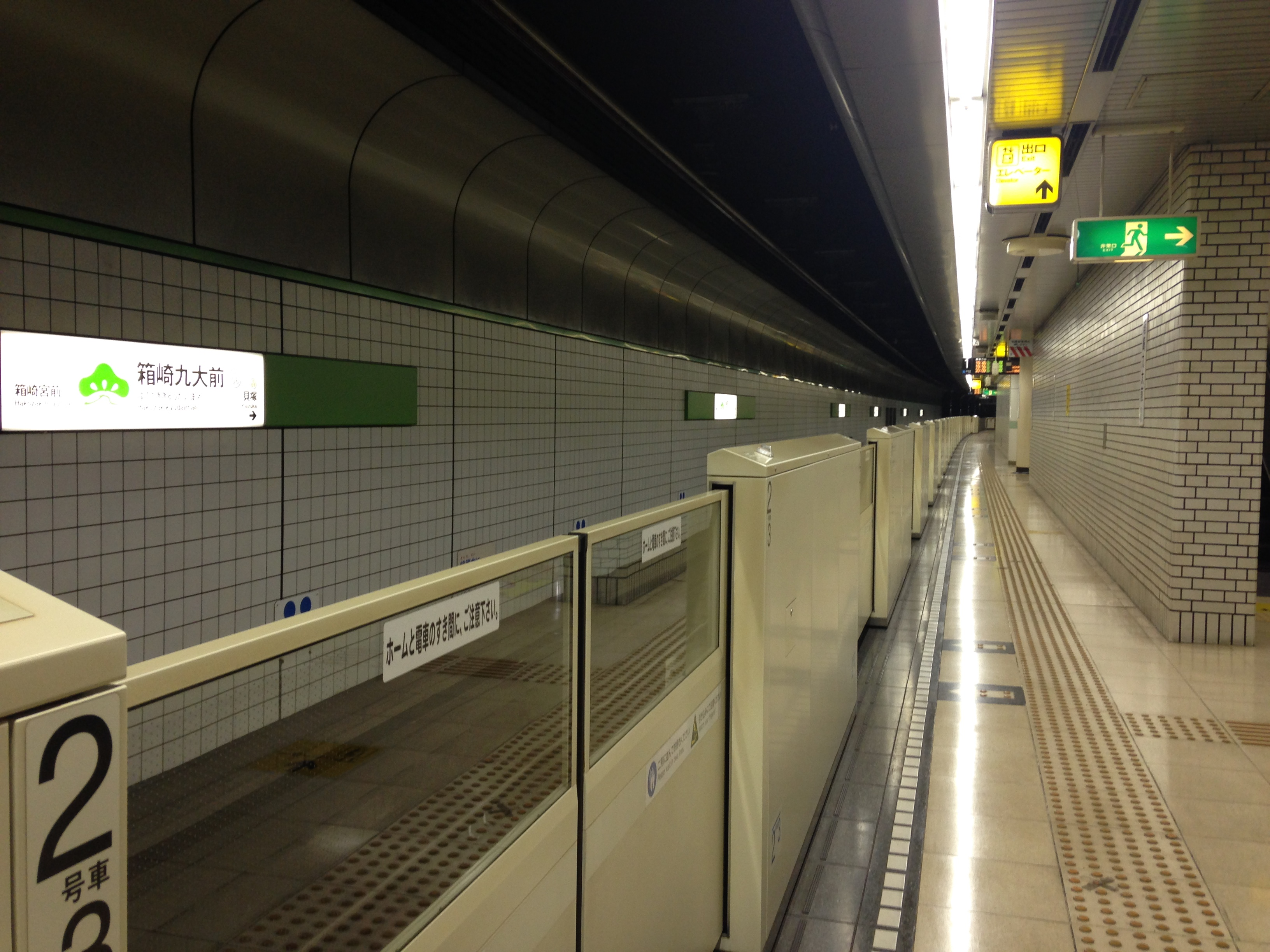 箱崎九大前駅のホーム